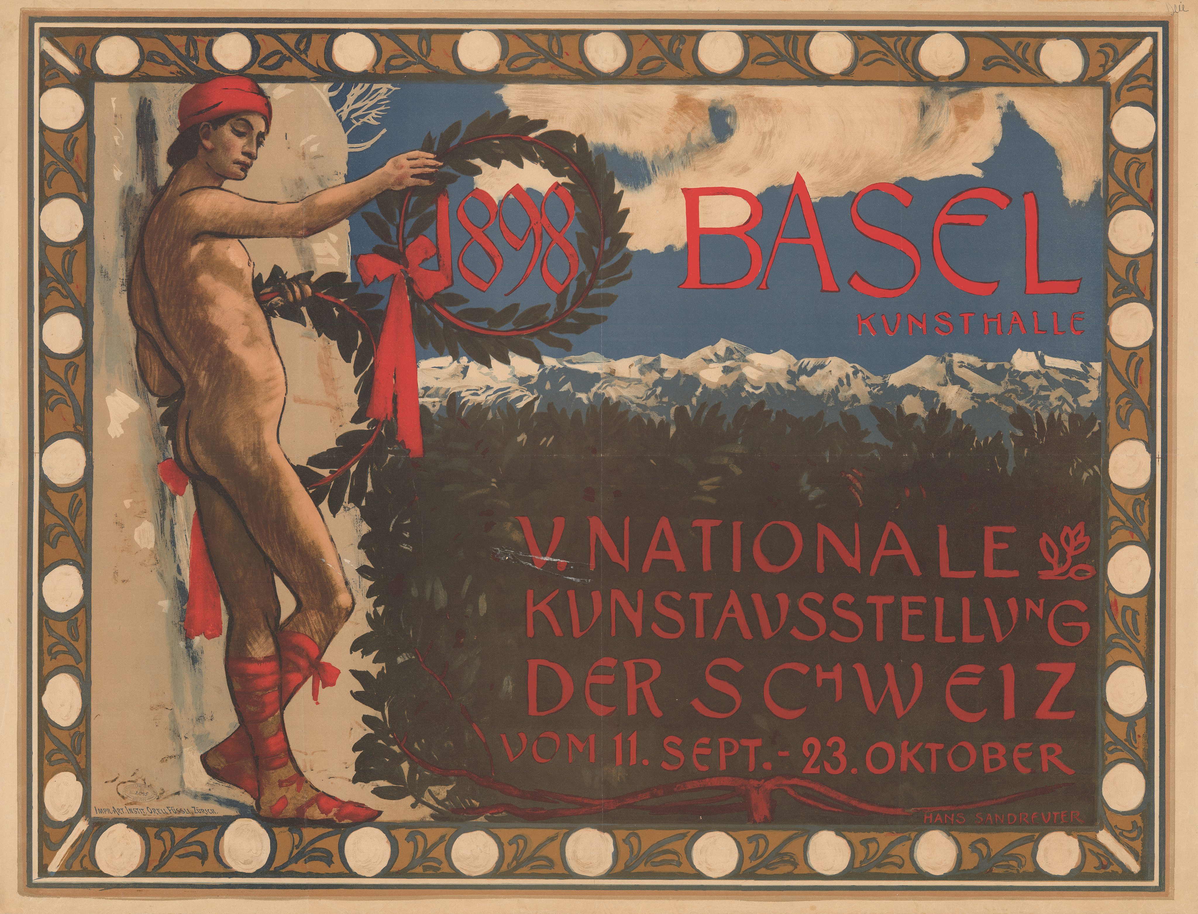 "Basel Kunsthalle 1898". Farblithografie, 81 x 105 cm